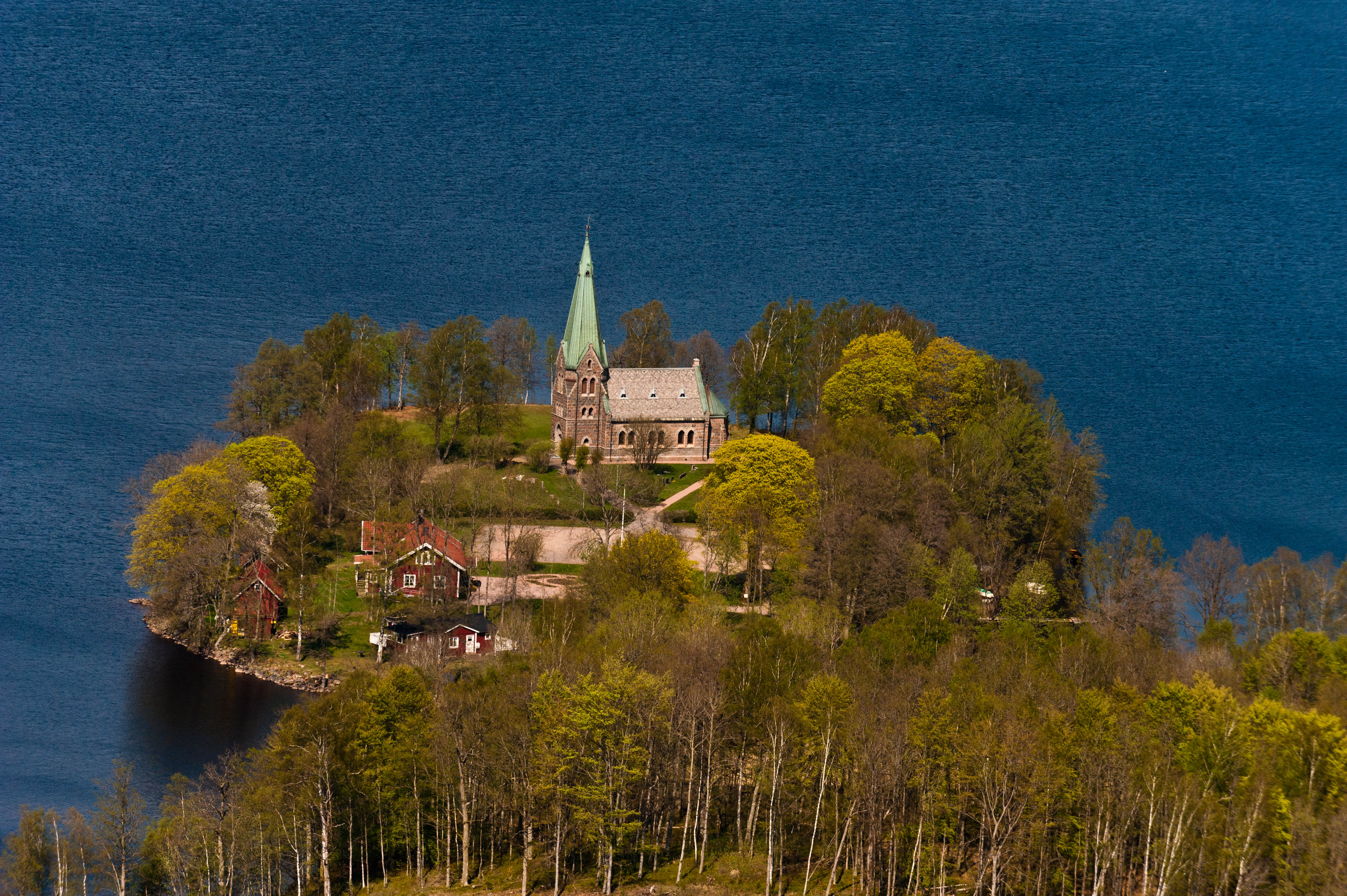 Sandviks kyrka från luften